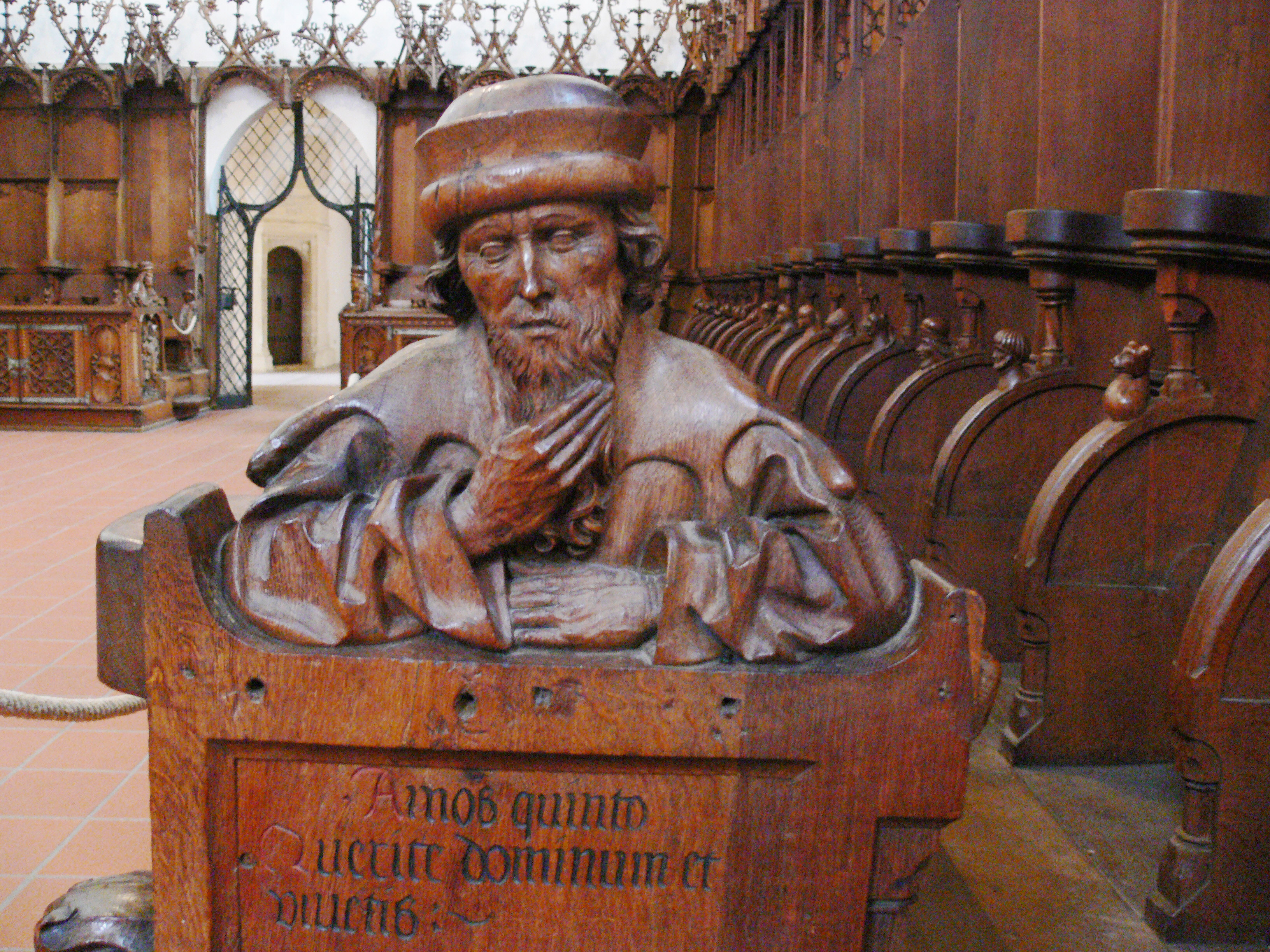 Kloster Blaubeuren, Klosterkirche, Chorraum Chorgestühl von Jörg Syrlin d. J., 1493 Prophet Amos